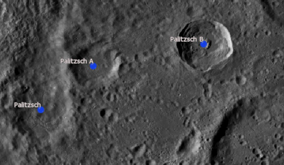 Cráter lunar Palitzsch. Cráteres satélite. (Imagen LRO)